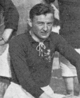 El futbolista Pedro Vallana (1897-1980), durante su participación en los Juegos Olímpicos de Amberes 1920 con la selección de España.